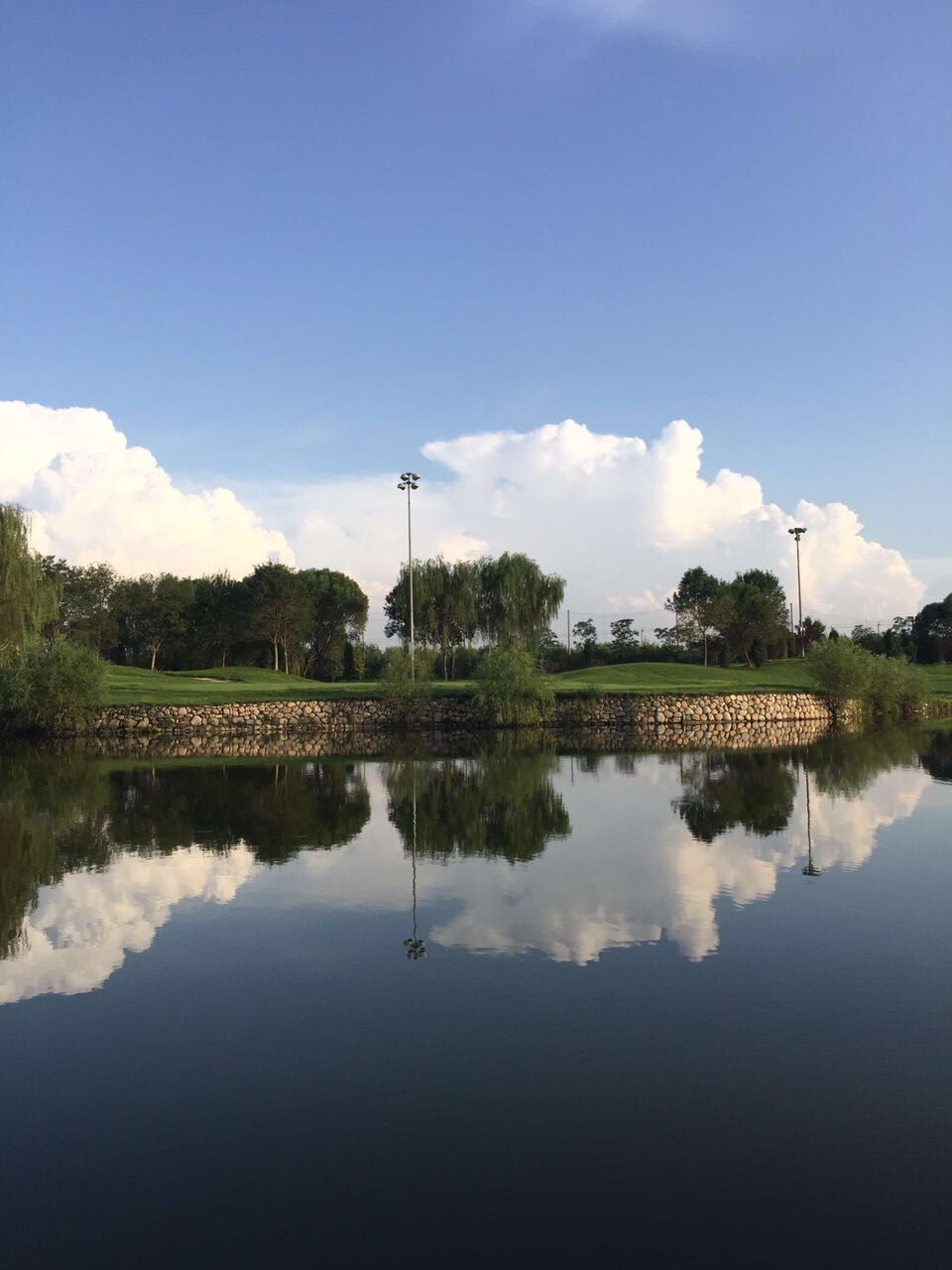 中文（中国大陆）: 拍摄于雄安新区白洋淀景区